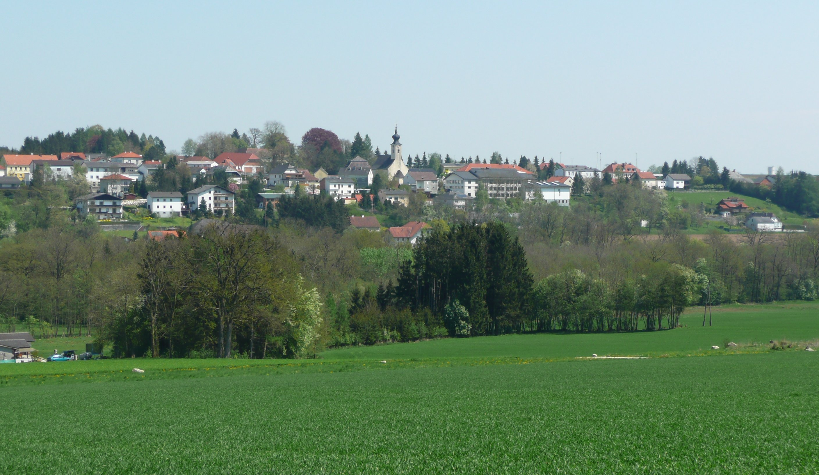 Blick auf Steinhaus